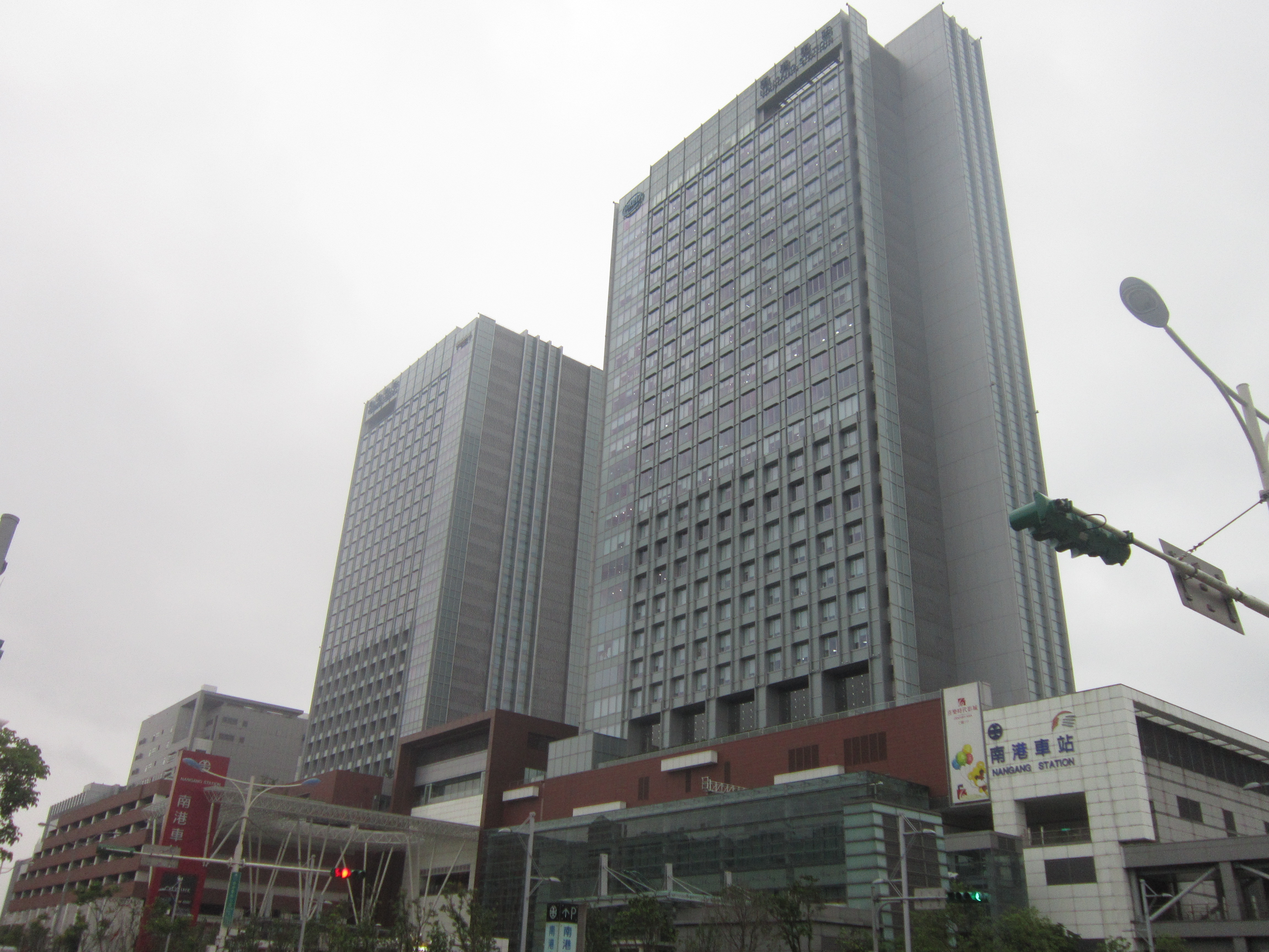 南港車站大樓一景(忠孝東路七段的立面)